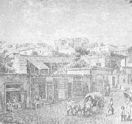 Шемаха. Главная улица.